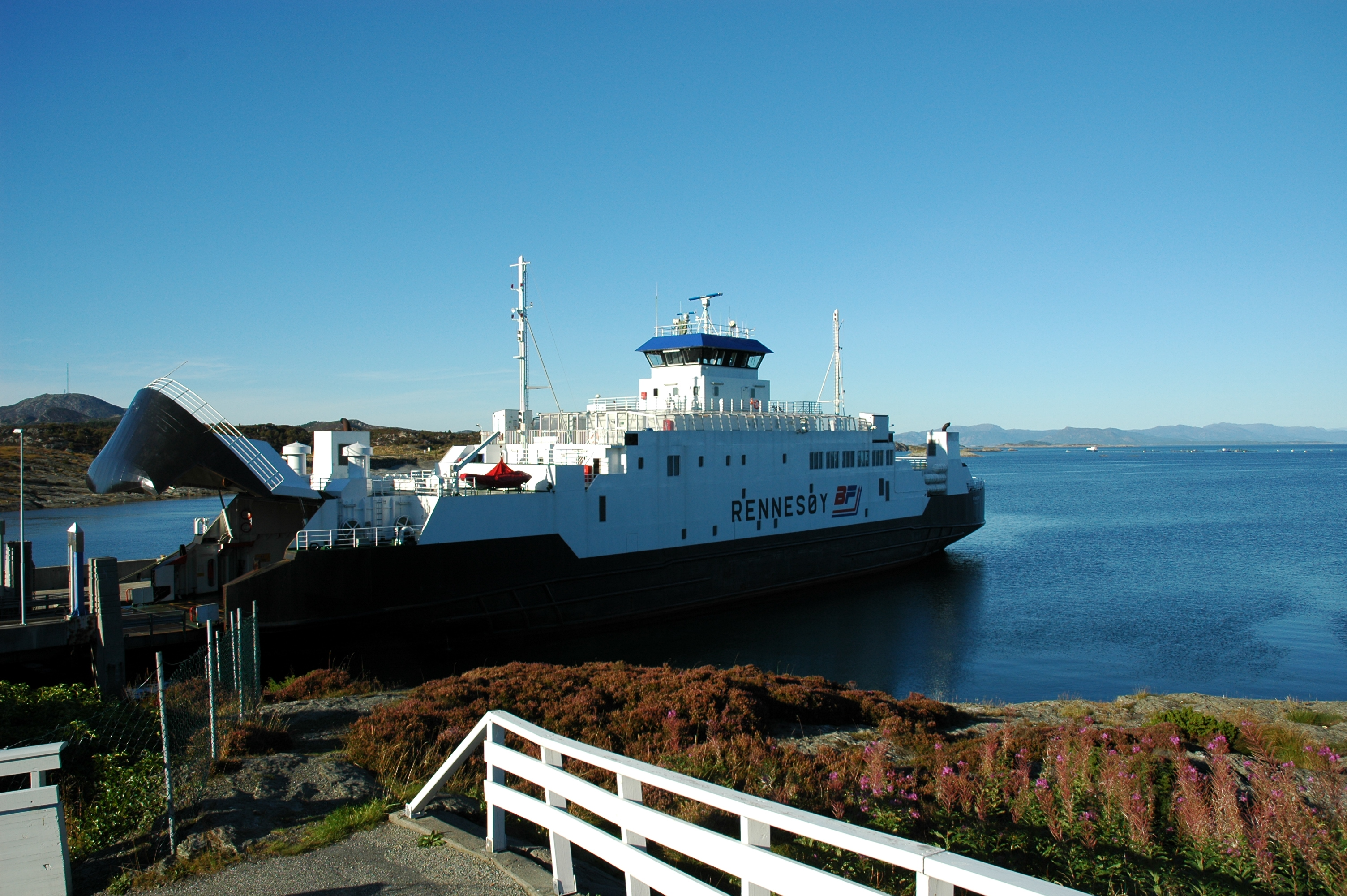 M/F Rennesøy ved kai i Arsvågen.